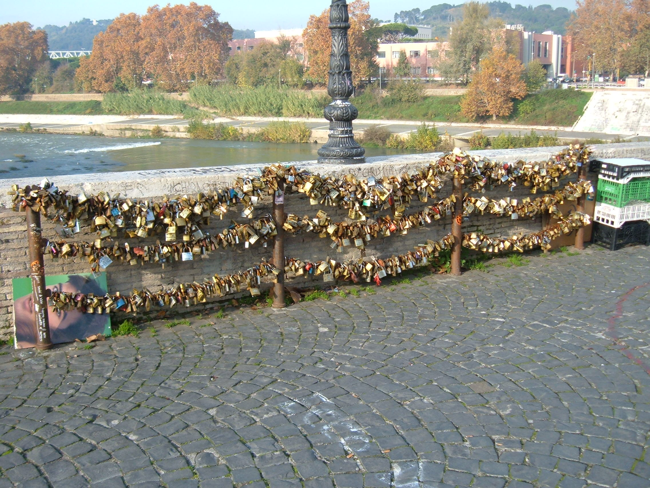 Lucchetti di Ponte Milvio.